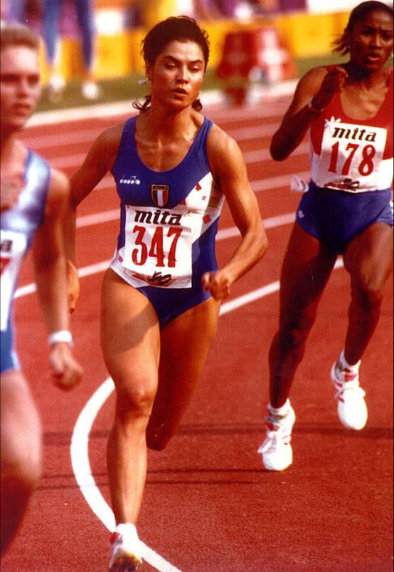 foto rappresentante Marisa Masullo